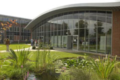 Campusimpression